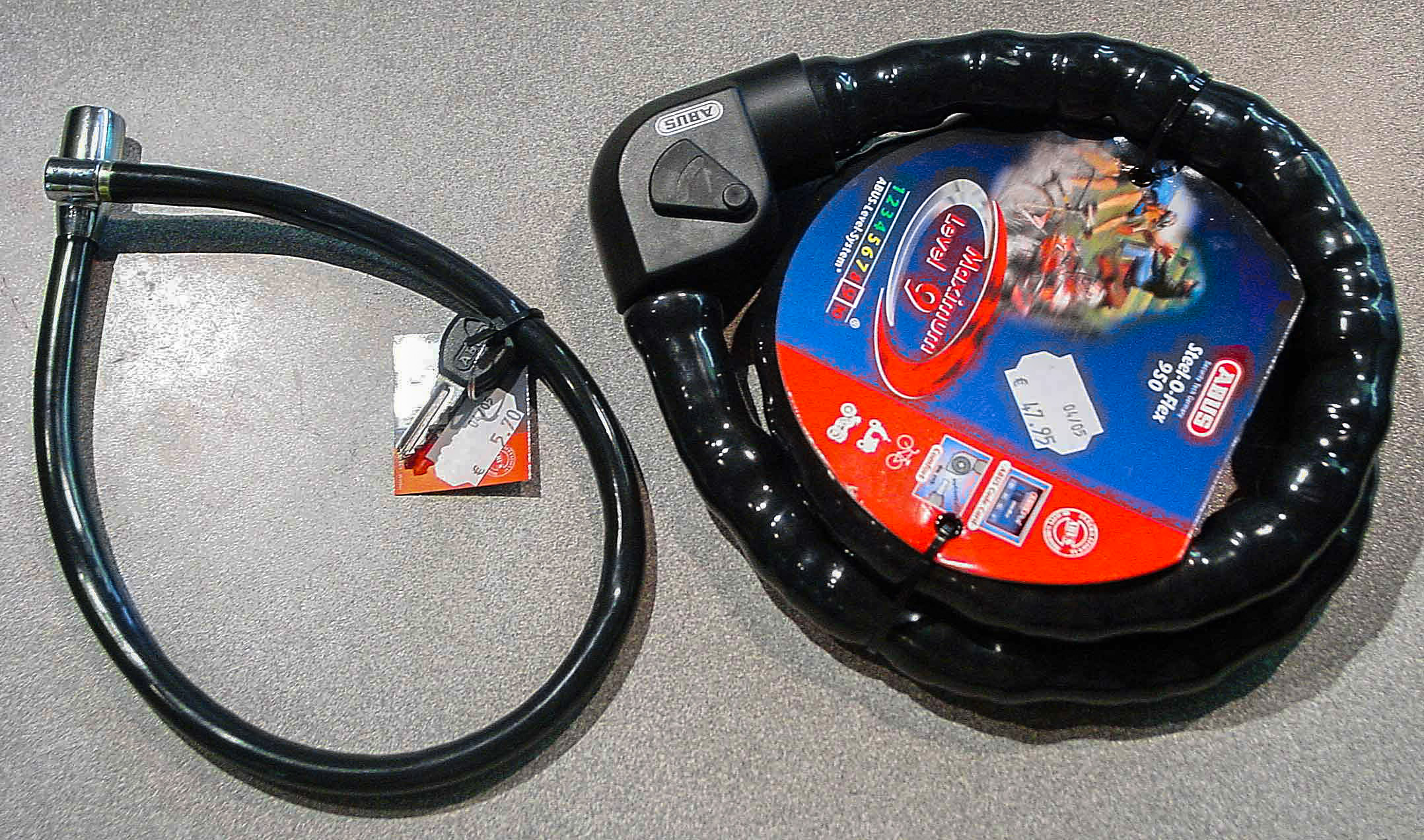 2 Kabelschlösser von ABUS